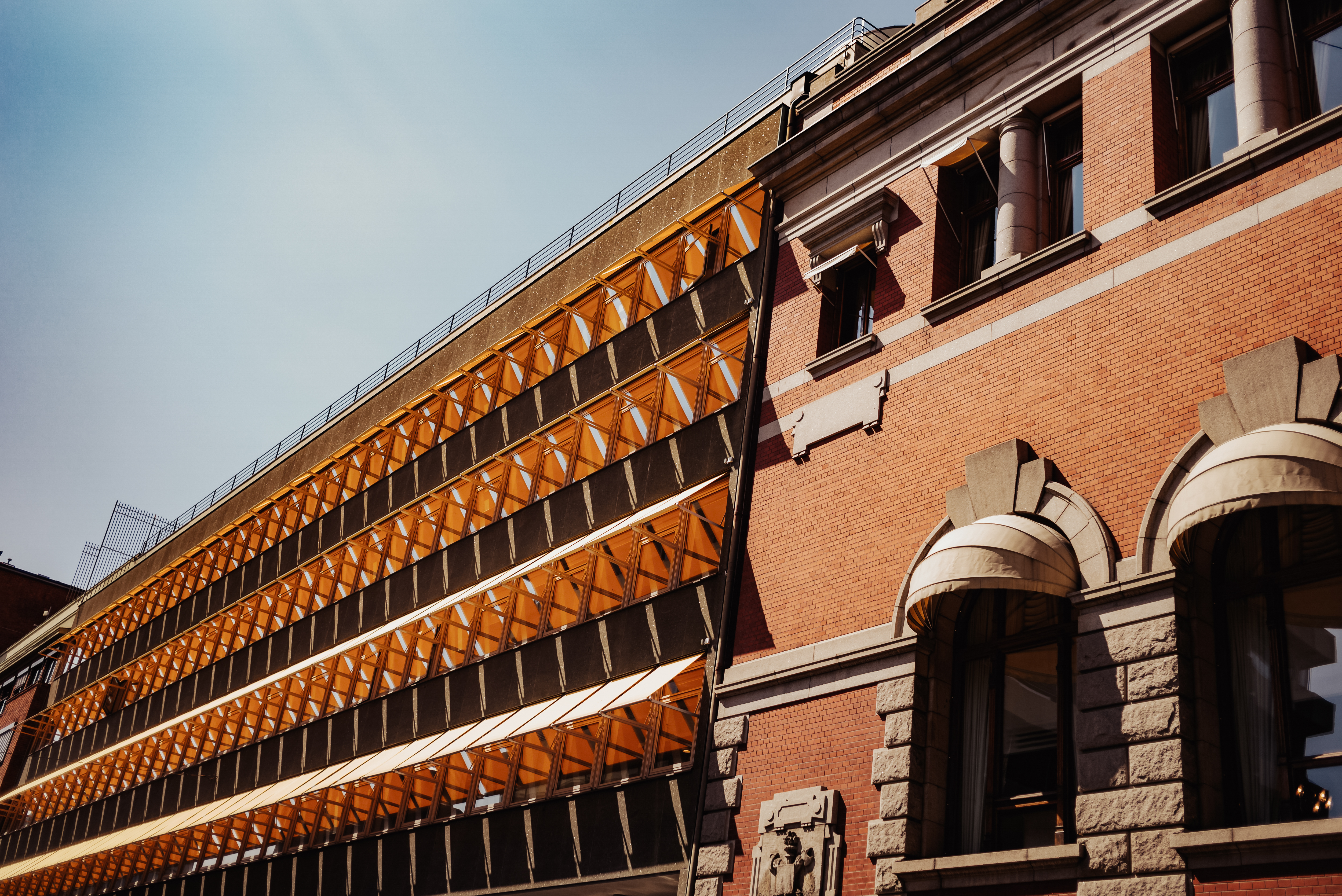 Fasaden til Kulturdepartementet og deler av Høyesterett i Grubbegata 1 i Oslo.